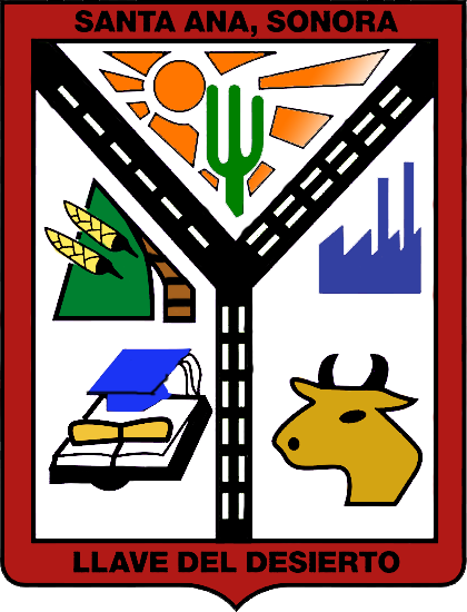 Escudo del municipio sonorense.